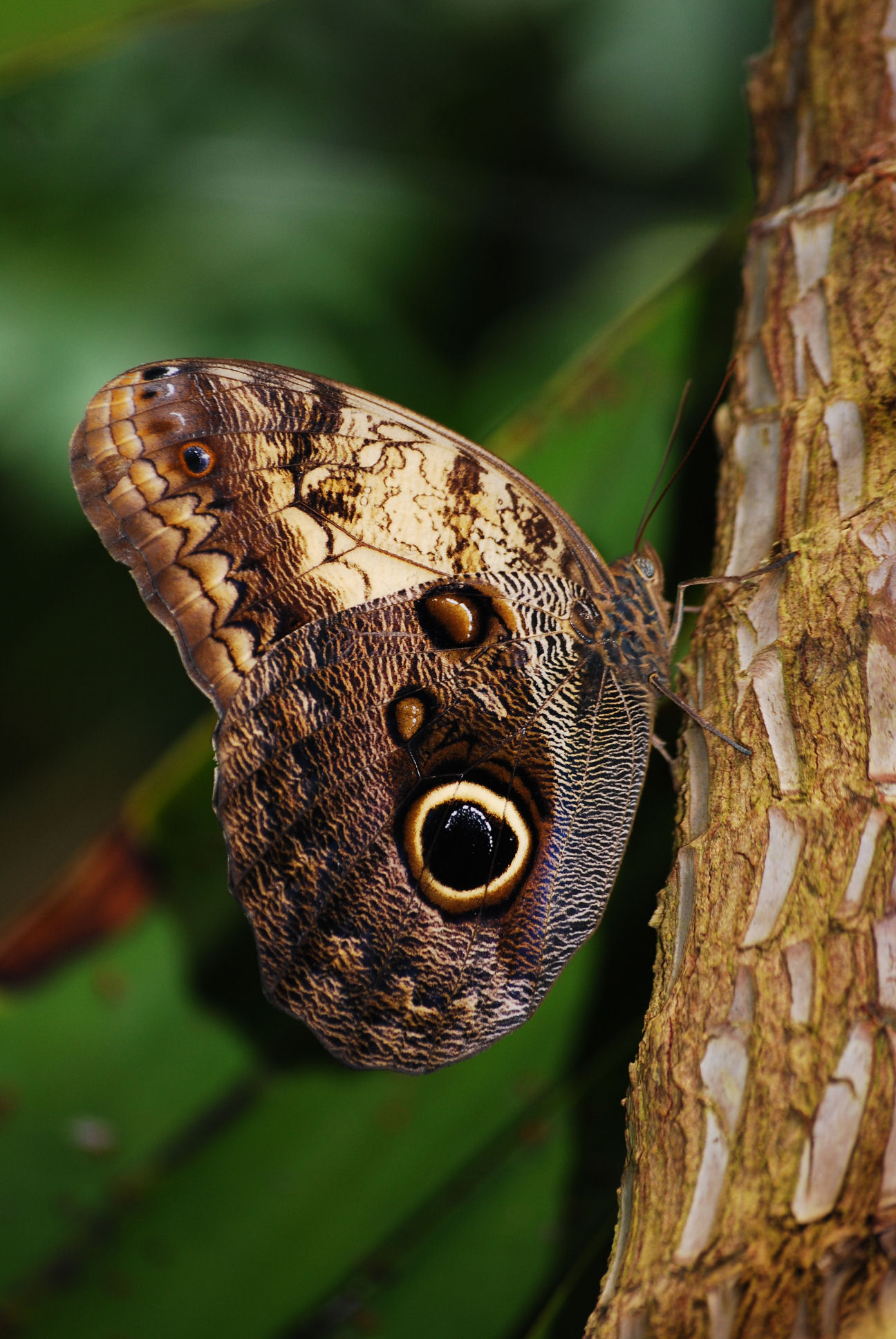 Caligo memnon in Bornholms Sommerfugelpark & Tropeland